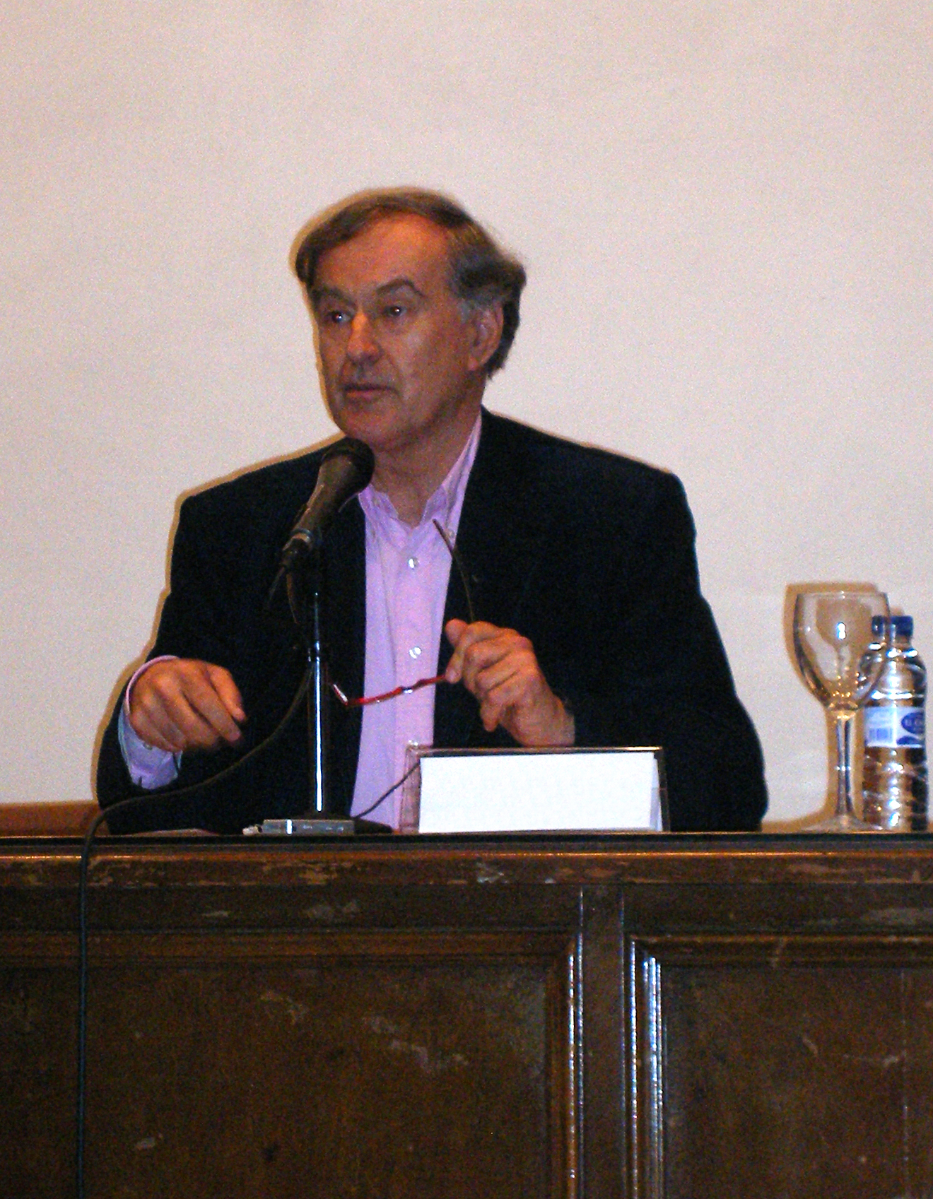 Aragonés: Brian Mott, en a presentazión de l'Academia de l'Aragonés en a Unibersidat de Zaragoza.